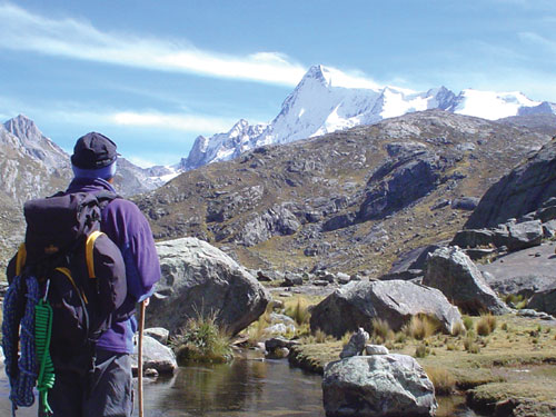 Nevado Pariacaca - Pico Sur